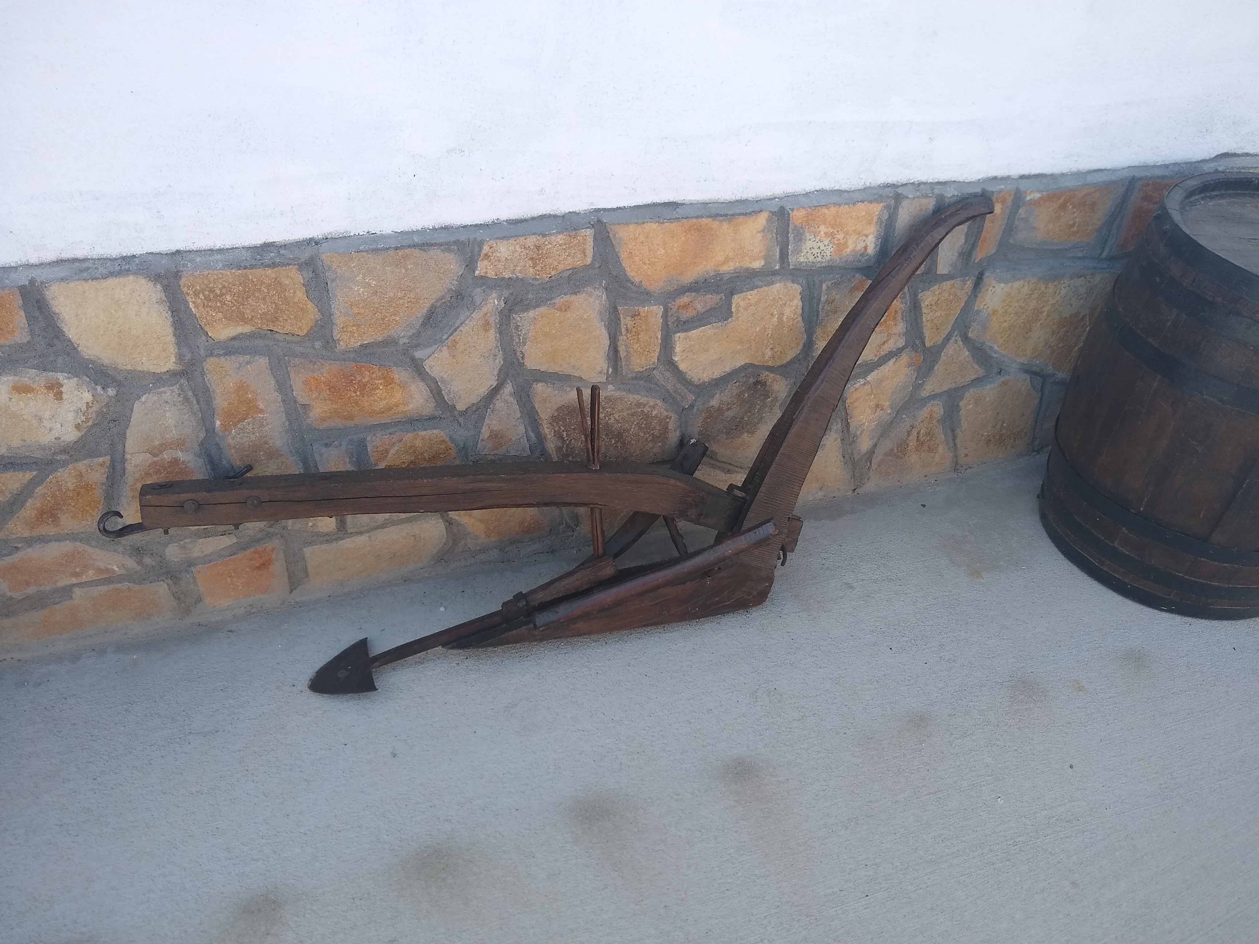 Реставриран селски плуг (XX. век, България).